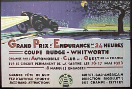 Poster des 24 Heures du Mans